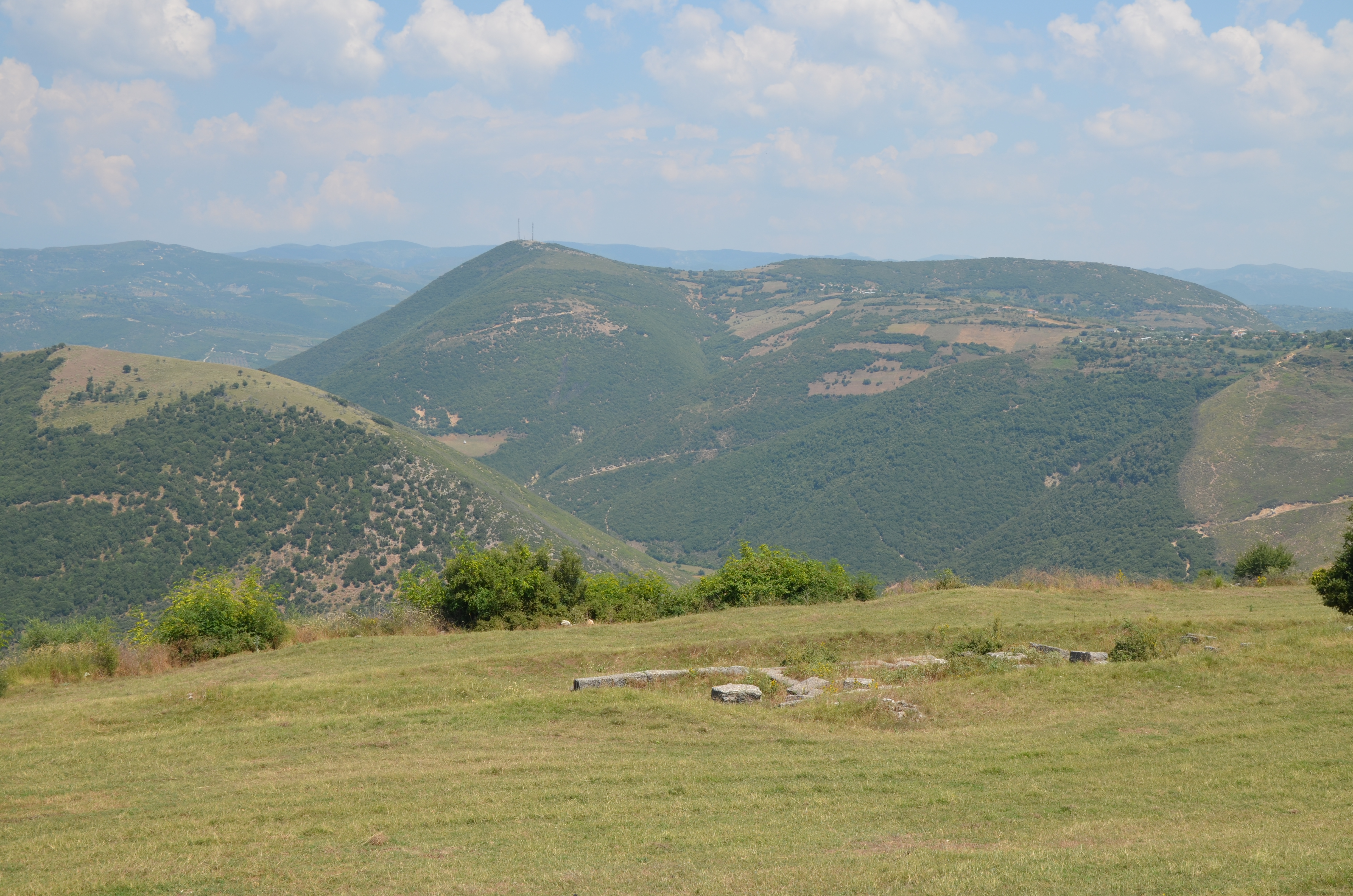 Albanian landscape